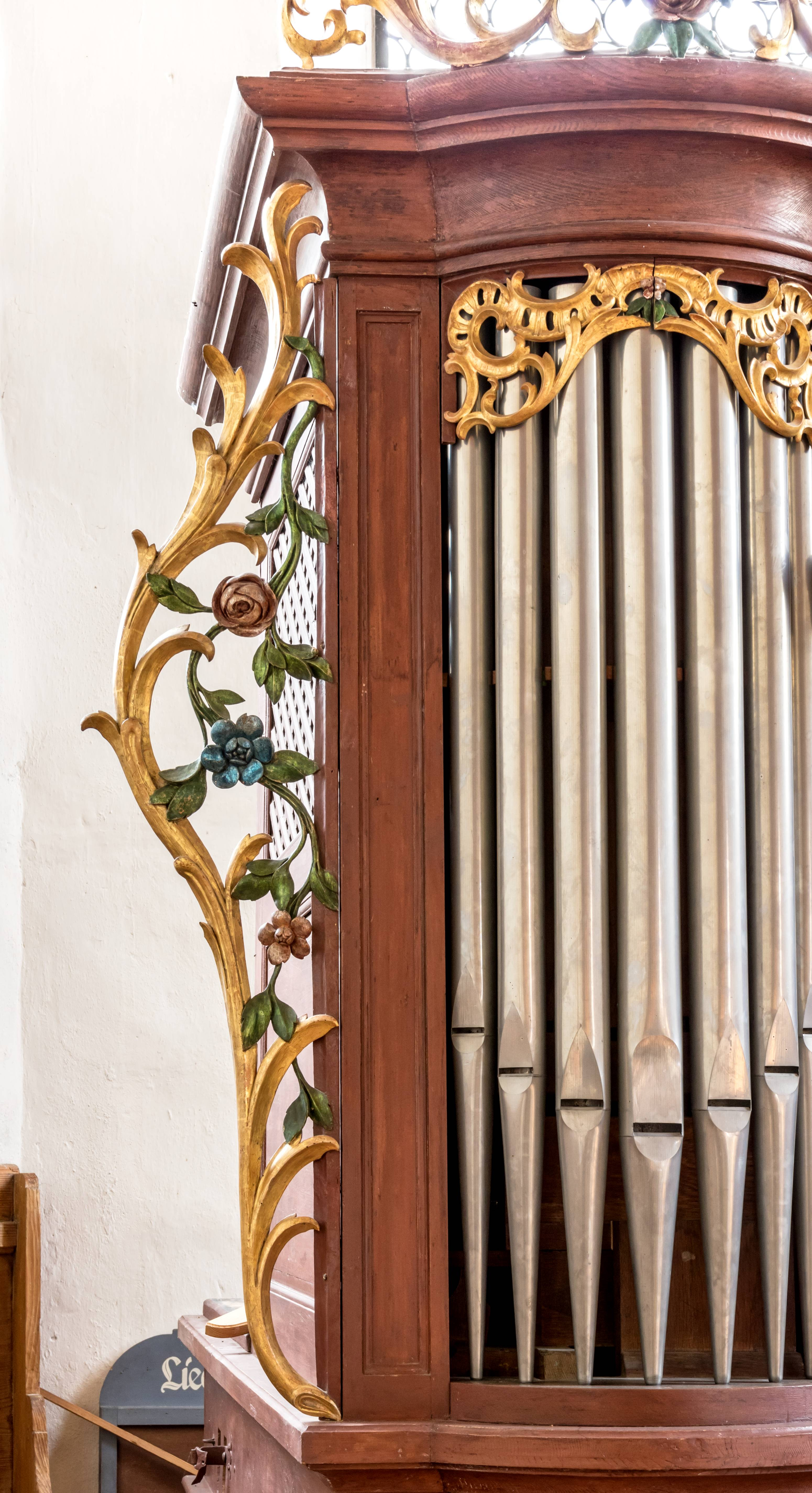 Bilder aus der evangelischen Kirche in Fischingen Die Orgel von Xaver Bernauer aus dem Jahre 1810 Der Schmuck an der linken Seite